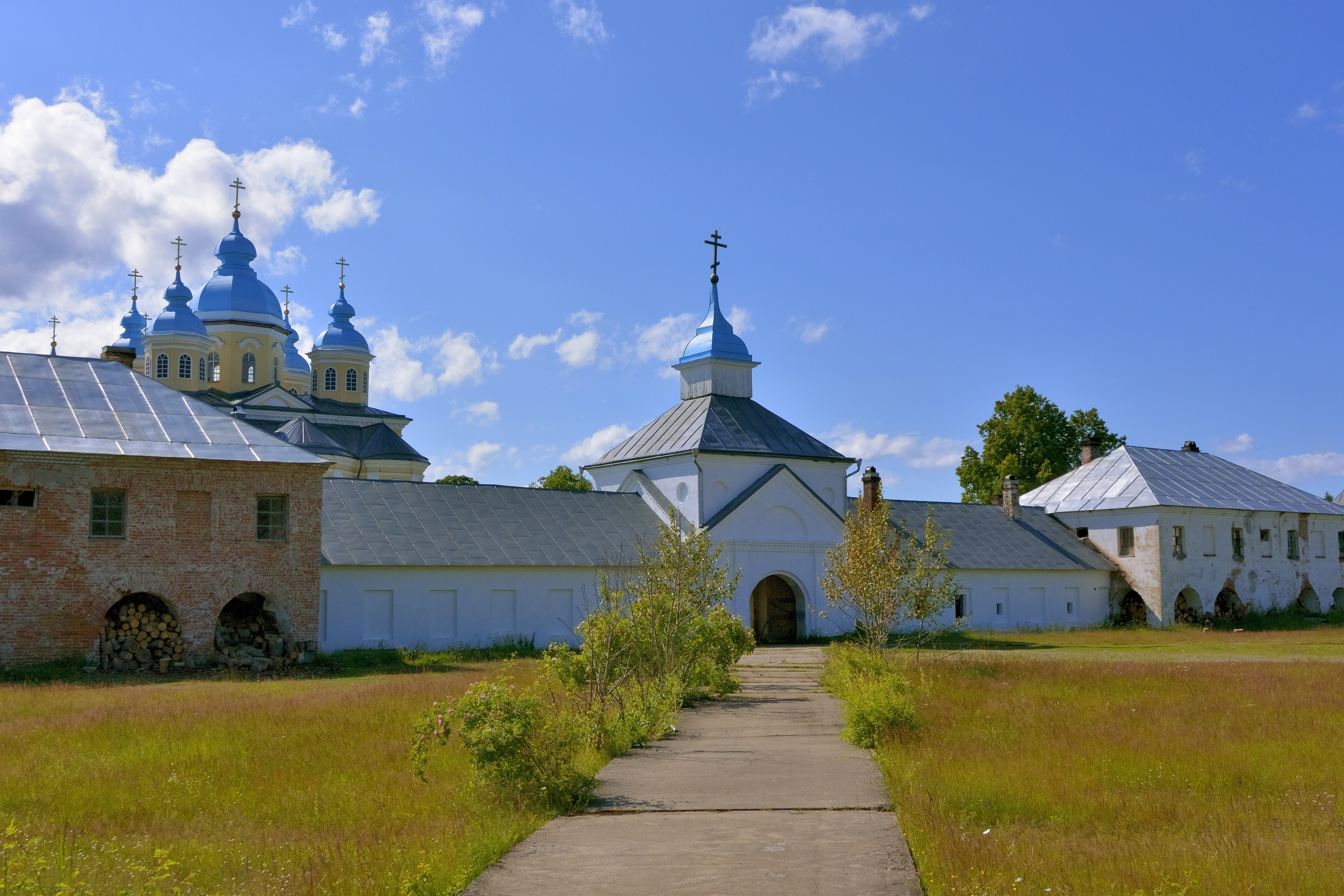 Башня надвратная с библиотекой: о. Коневец, Приозерский район, Ленинградская область